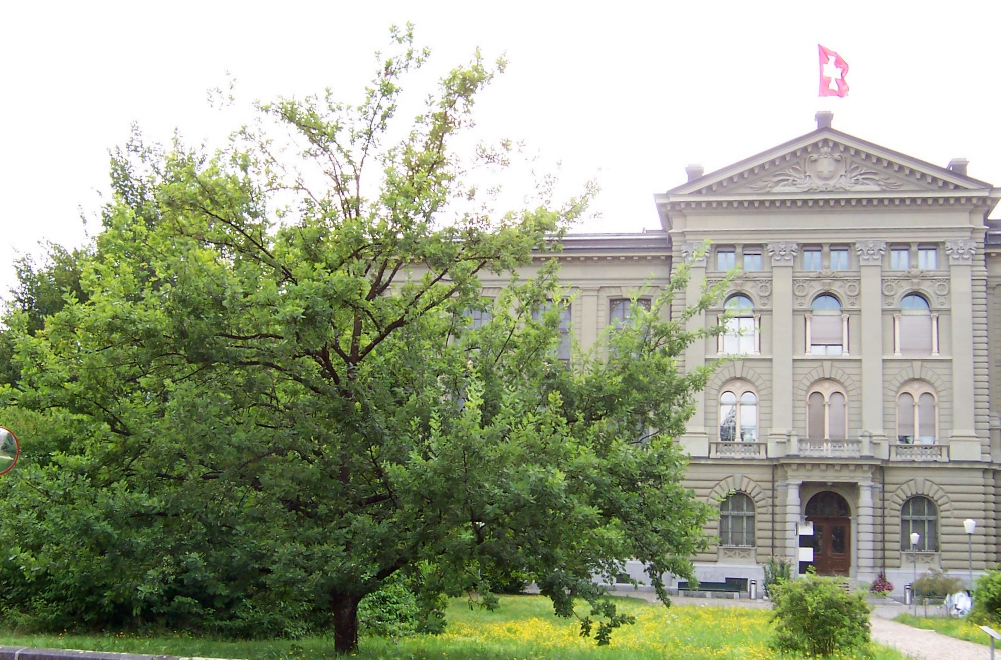 Elisabeth-Kopp-Eiche vor dem Schweizerischen Bundesarchiv in Bern, gepflanzt 1984 anlässlich der Wahl von Elisabeth Kopp zur ersten Bundesrätin der Schweiz.